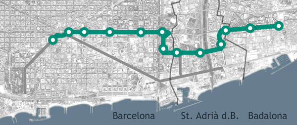 Plànol de la línia T5 del Trambesòs